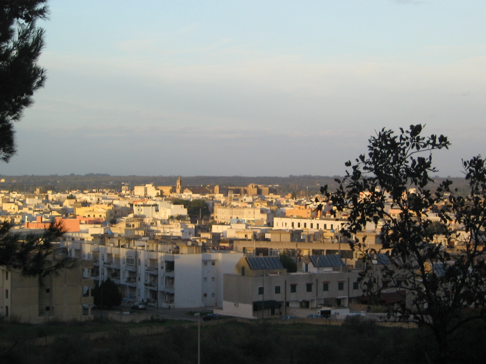 Tricase